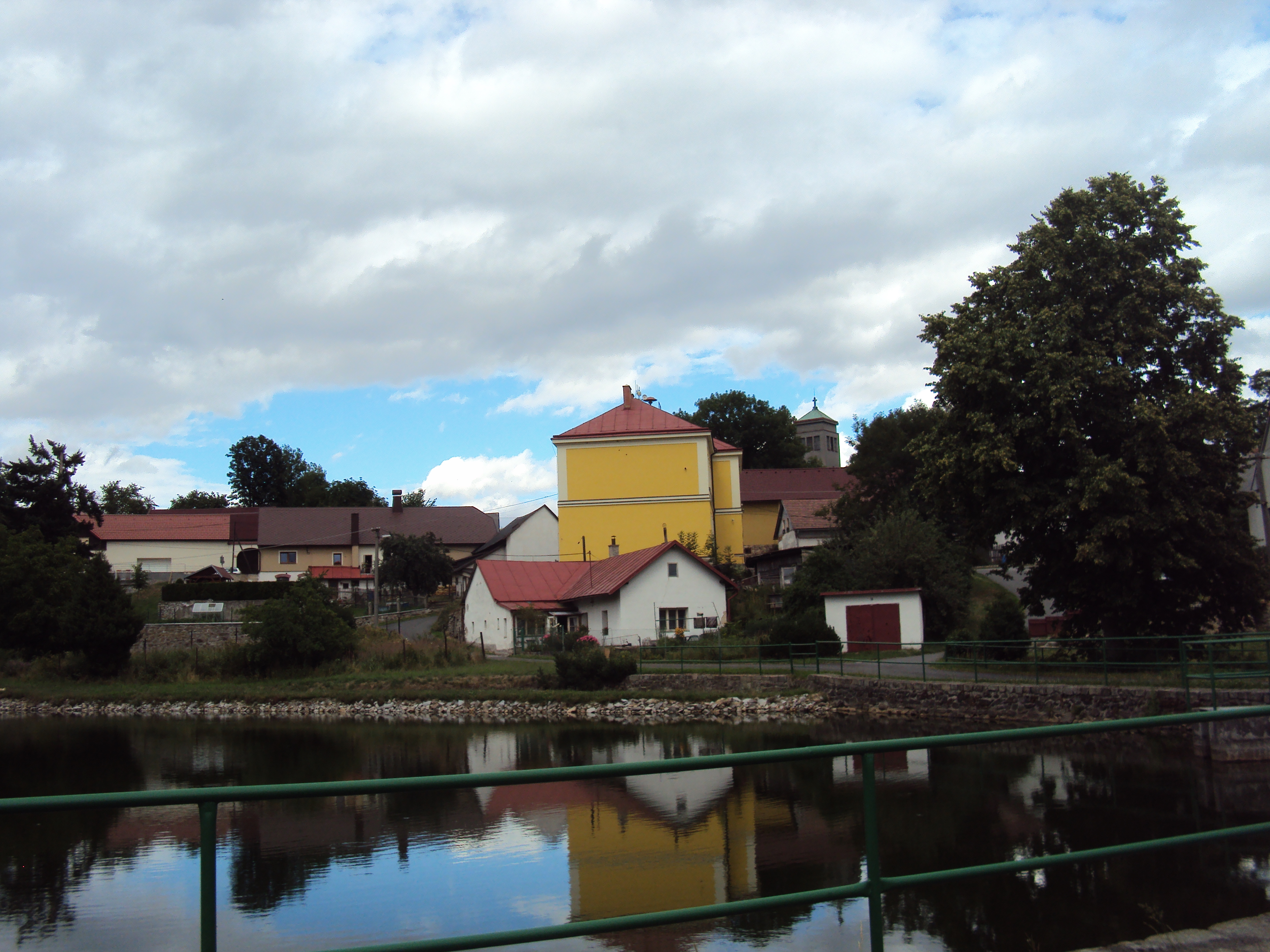 Smrčná, obec v okrese Jihlava